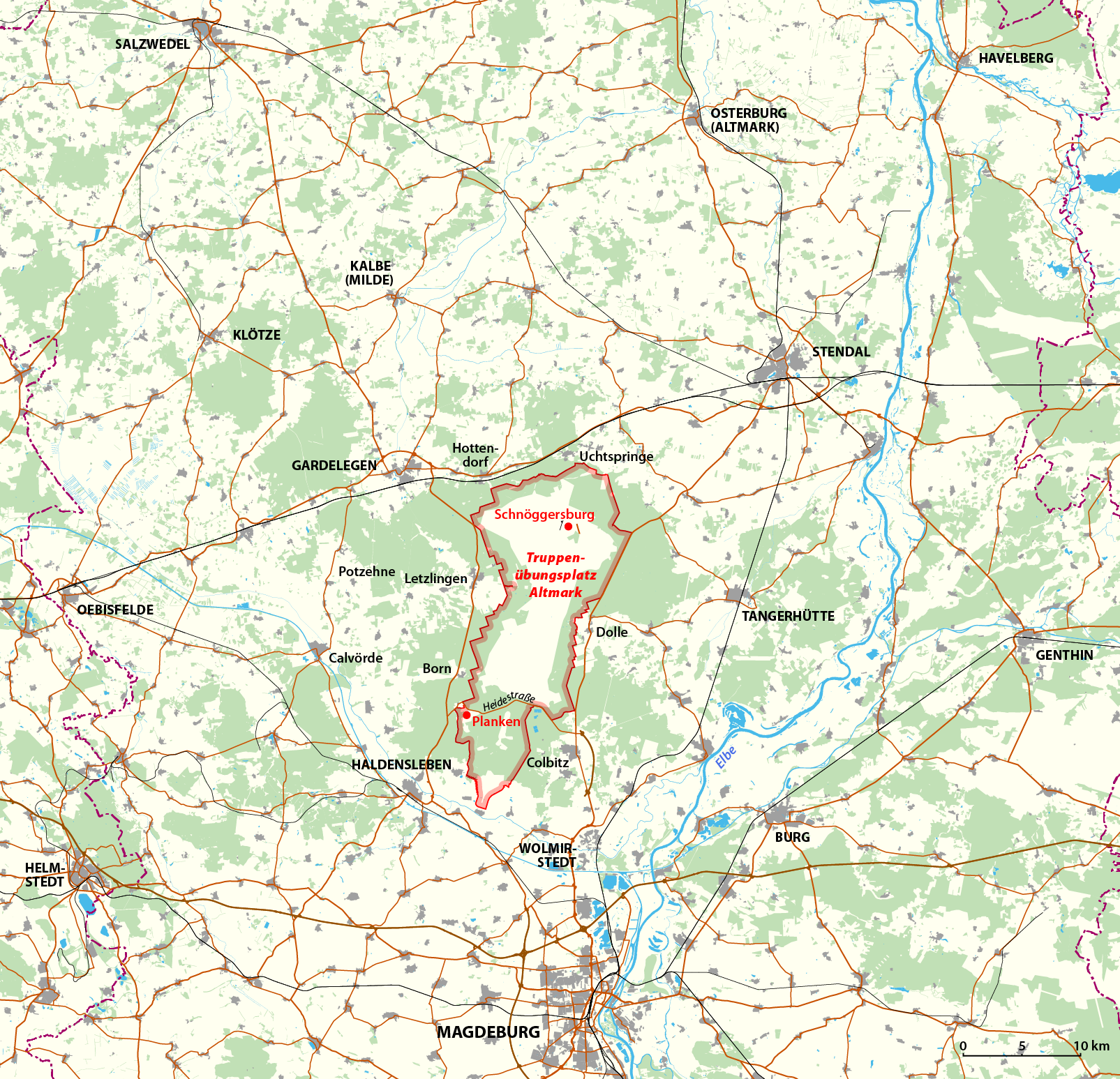 Karte des Truppenübungsplatzes Altmark